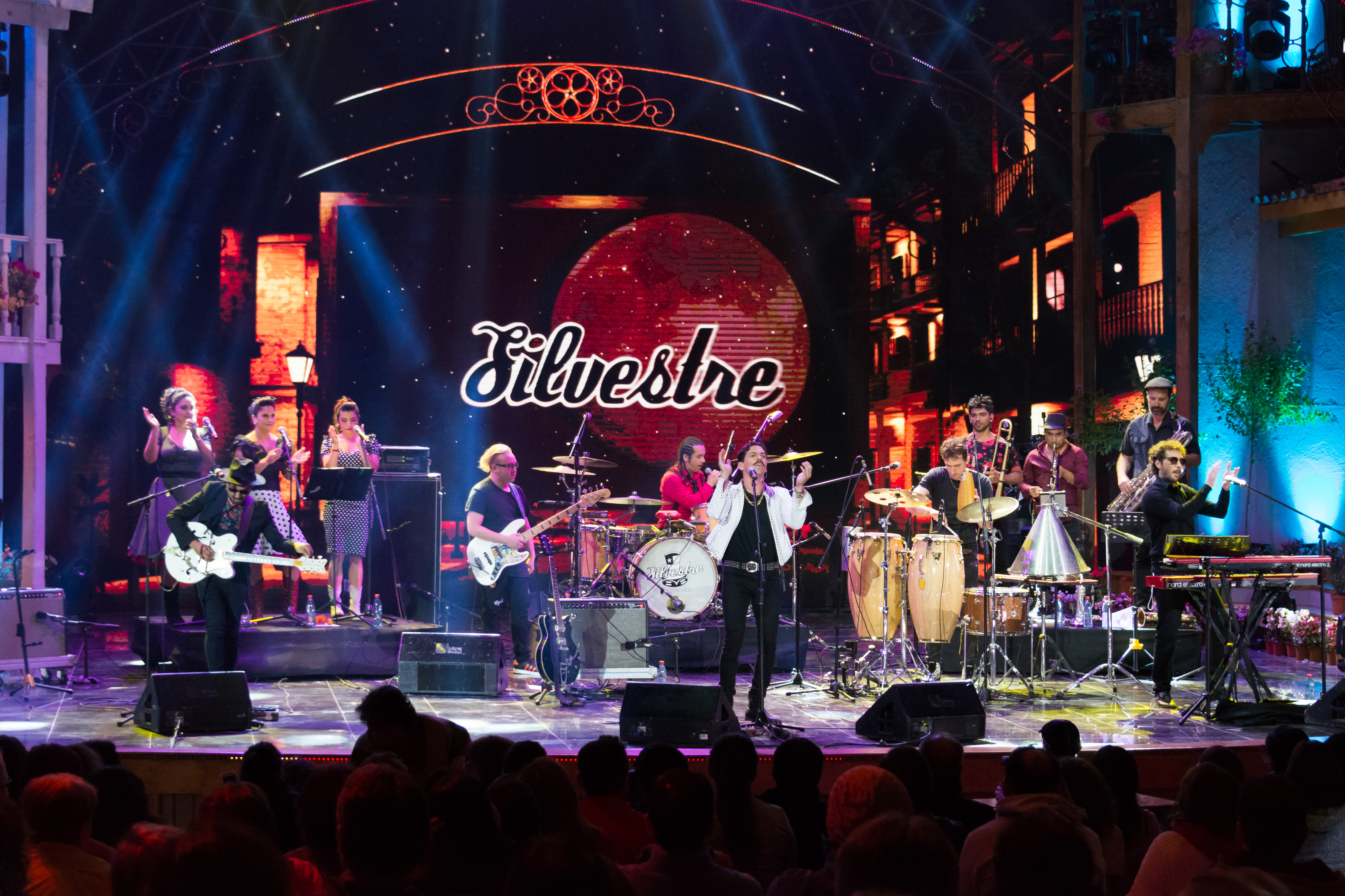 Silvestre, Festival del Huaso de Olmué, El Patagual, Olmué, Región de Valparaíso, Chile.